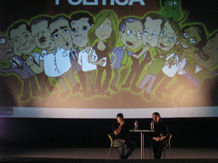 directores de Internautismo Crónico durante una conferencia en Cali.